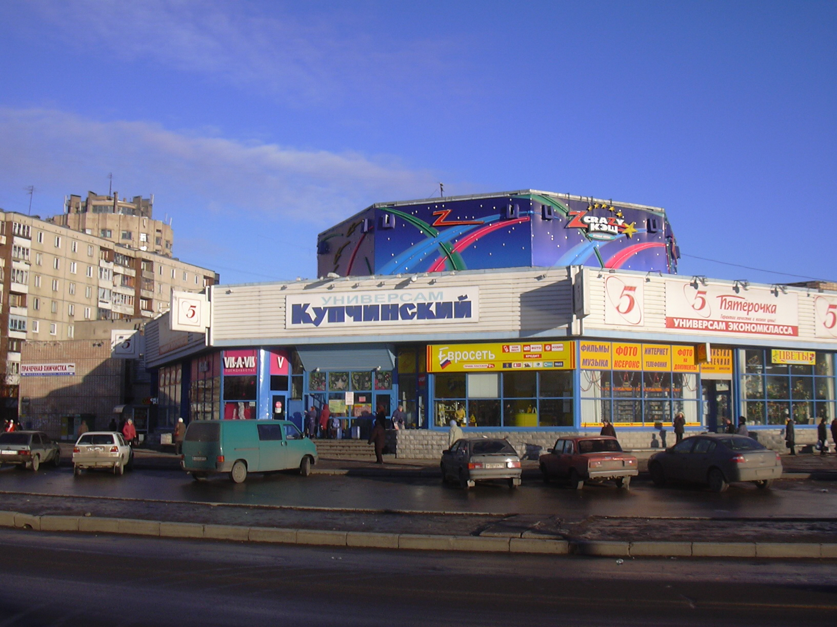 supermarket "Kupchinsky" on Kepchinsky street; Купчинская 32